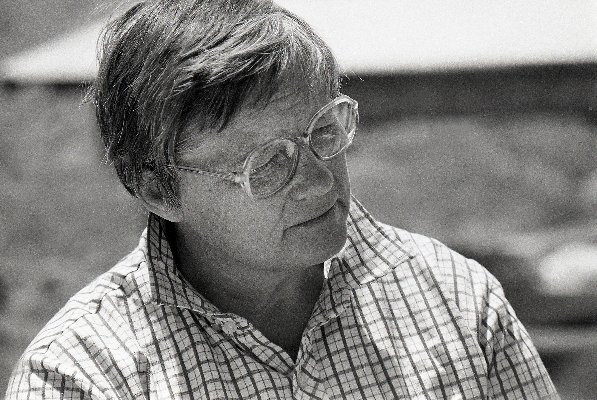 Ljudmilla Agranovskaja